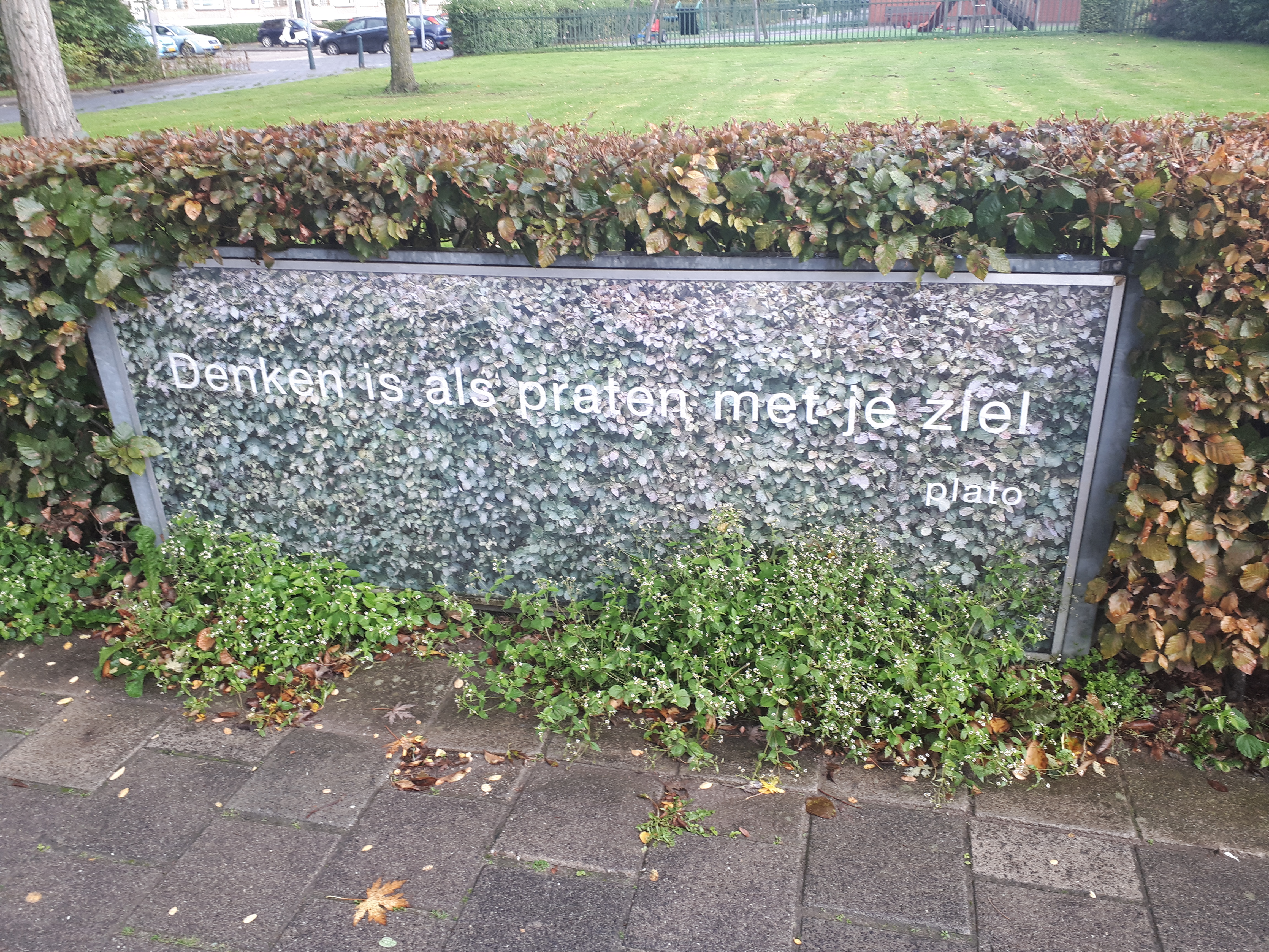 Deze gedenkplaat staat in de Platostraat te Rotterdam. Hierop staat een uitspraak van de filosoof Plato op.